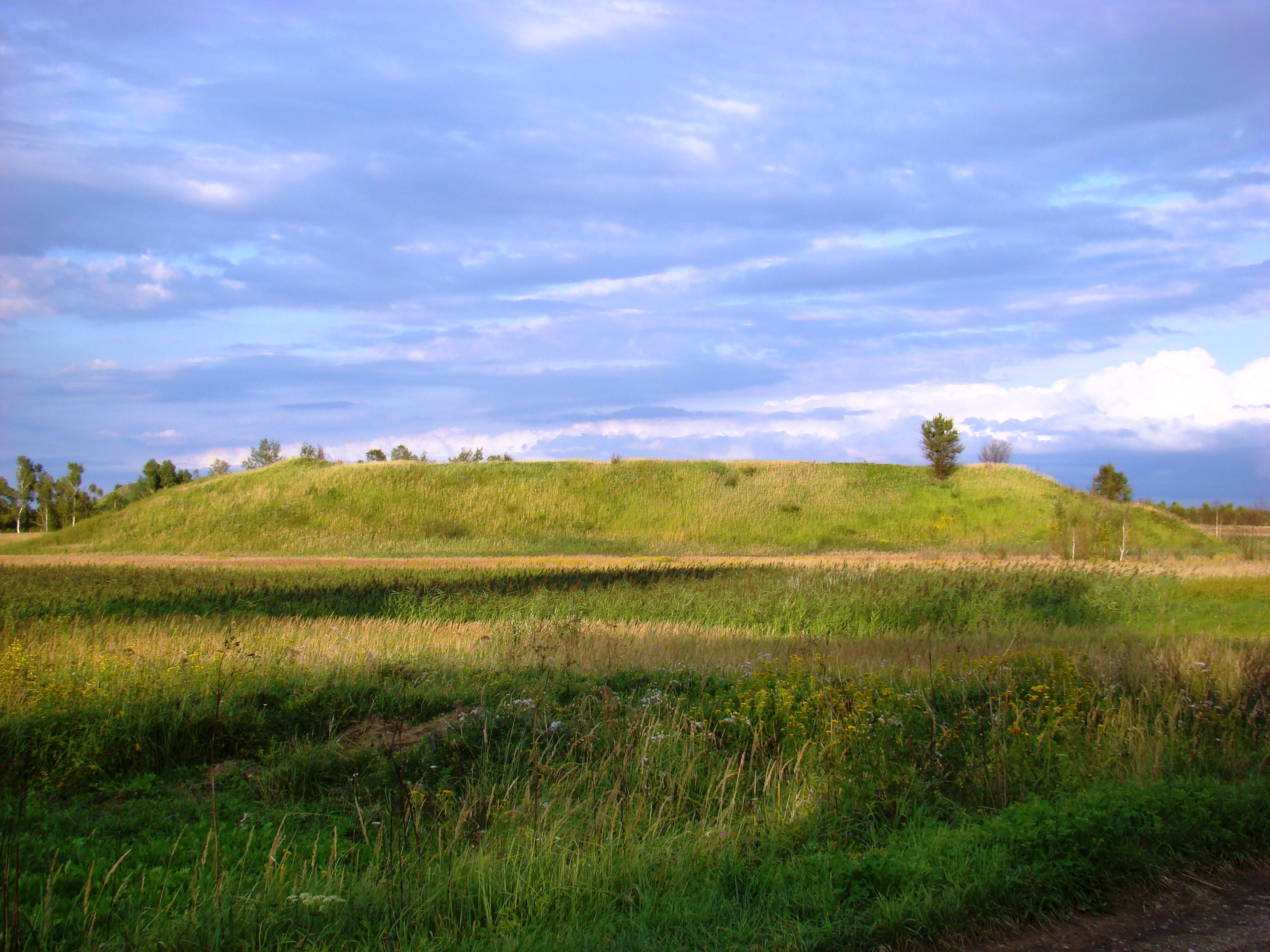 Pozostałości hałdy kopalni rud żelaza "Franciszek stary" w okolicach Liszki Dolnej